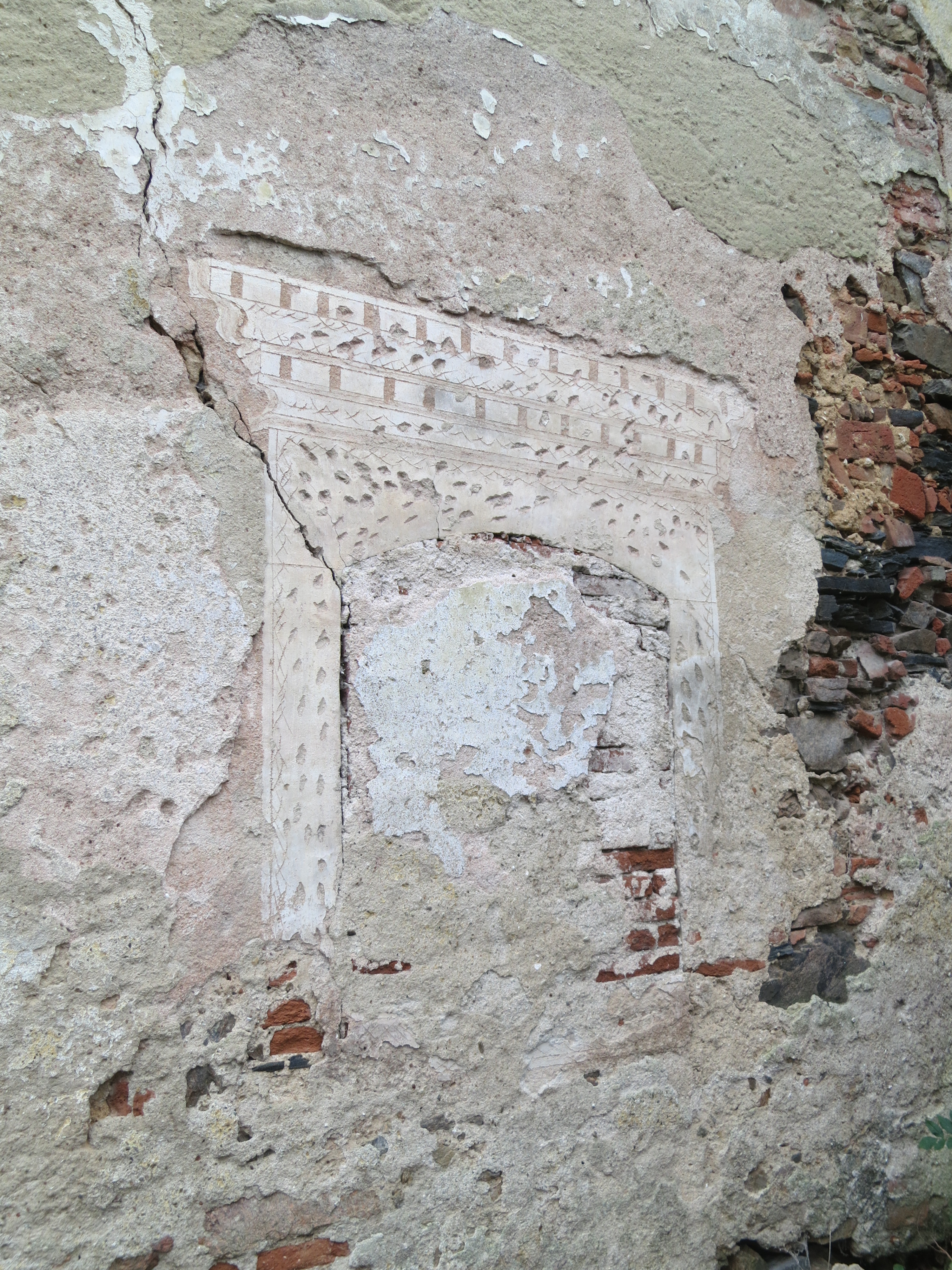 Iluzivní sgrafitová výzdoba na průčelí bývalé renesanční sladovny dvora Alinkova